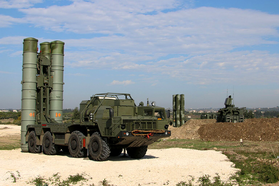 26.11.2015 Выгрузка зенитных ракетных комплексов С-300 (авиабаза «Хмеймим», Сирийская Арабская Республика)